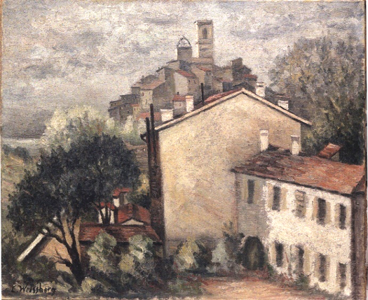 Tableau Vue de Saint-Paul-de-Vence, de Léon Weissberg